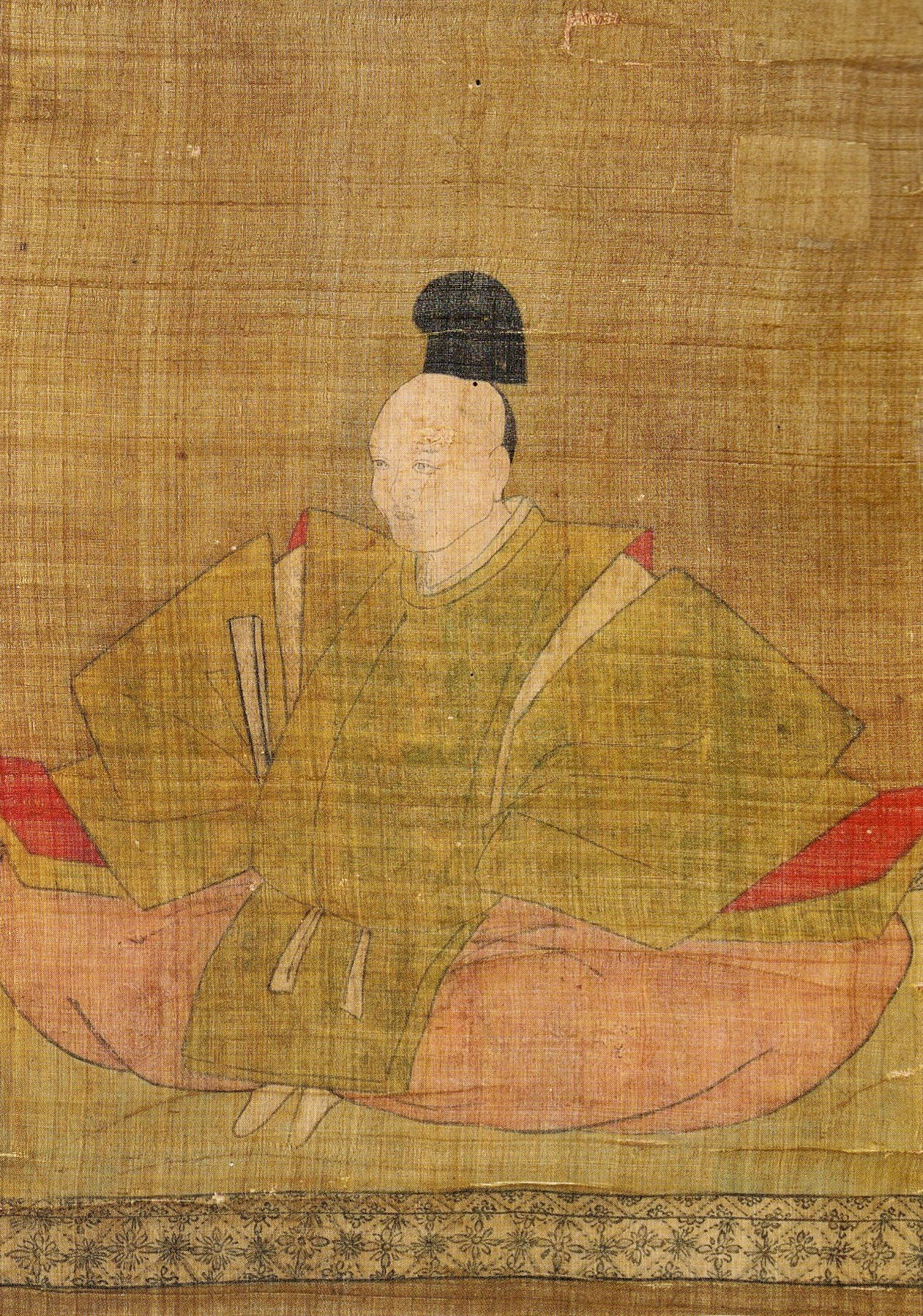 芳賀高定の肖像画。